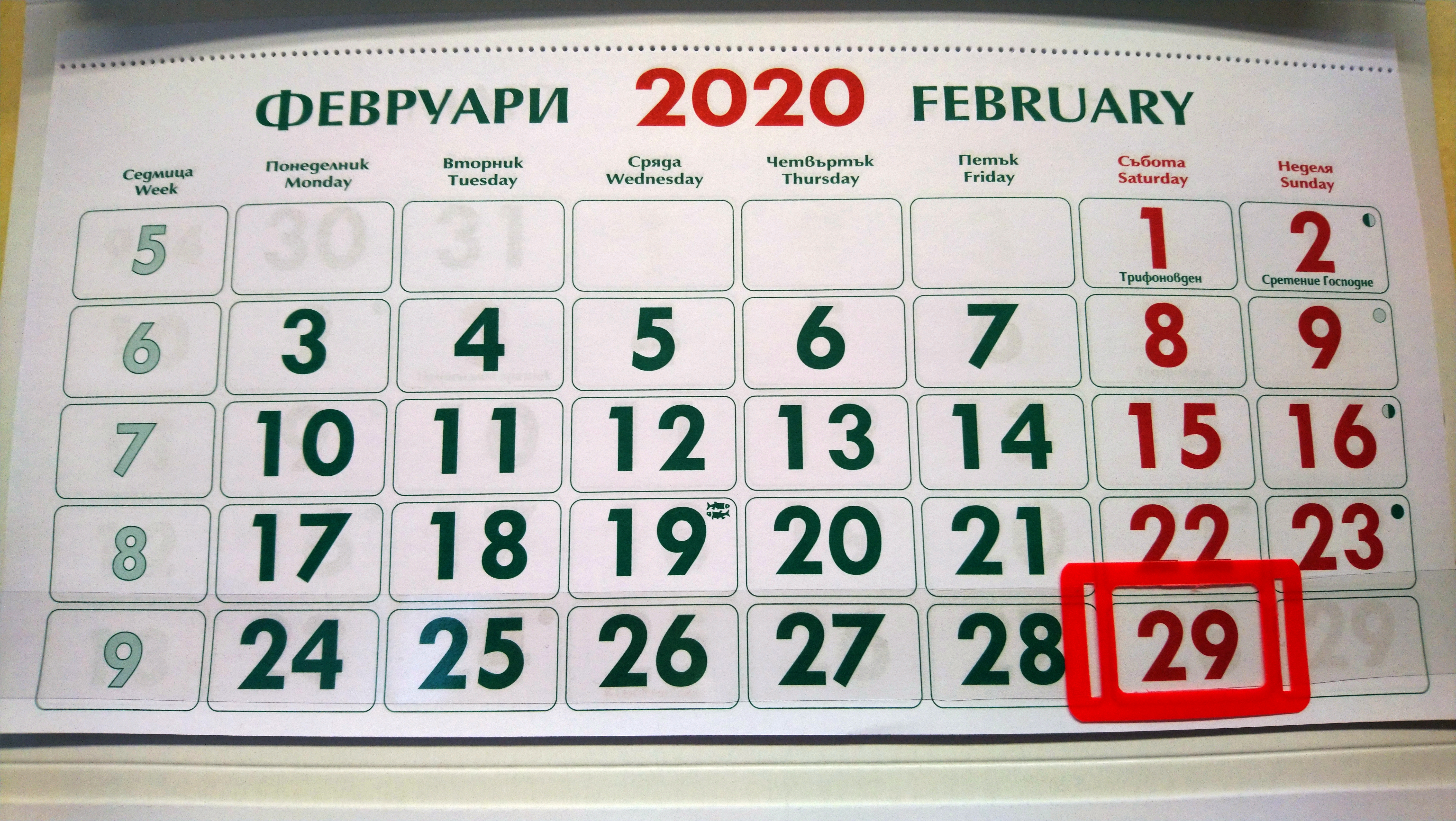 Календар за февруари 2020 с отбелязана датата 29 февруари